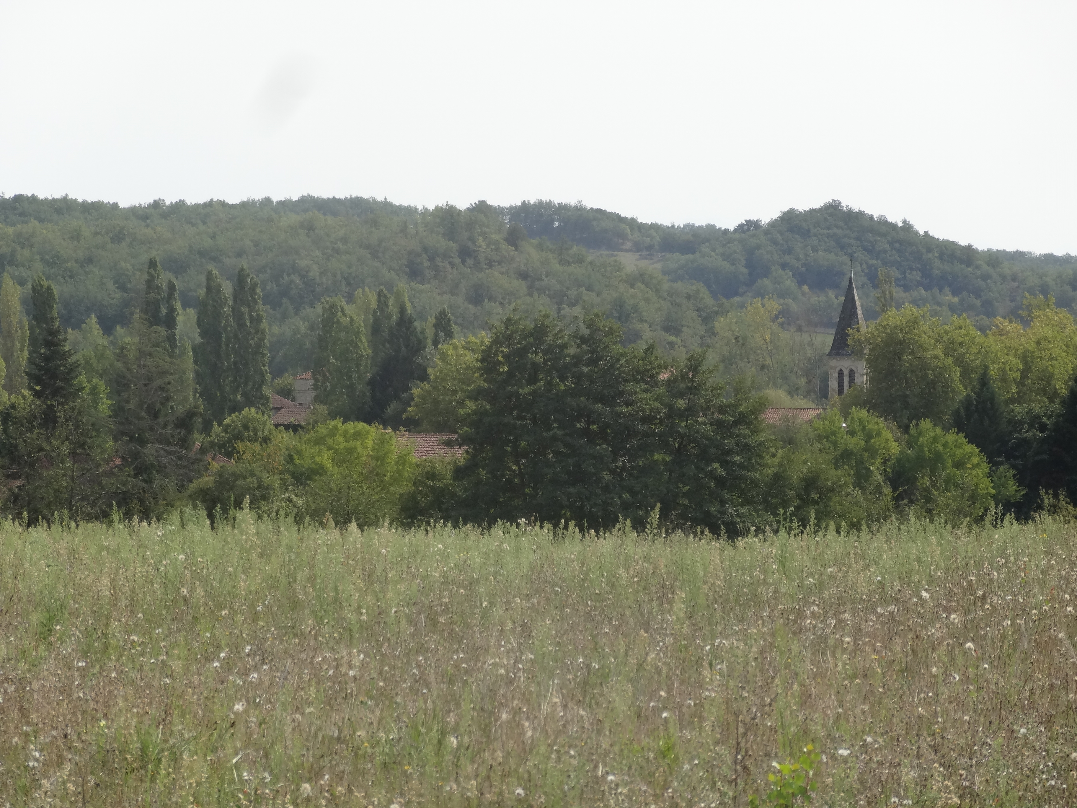 Moncorneil-Grazan vu depuis l'église de Grazan.